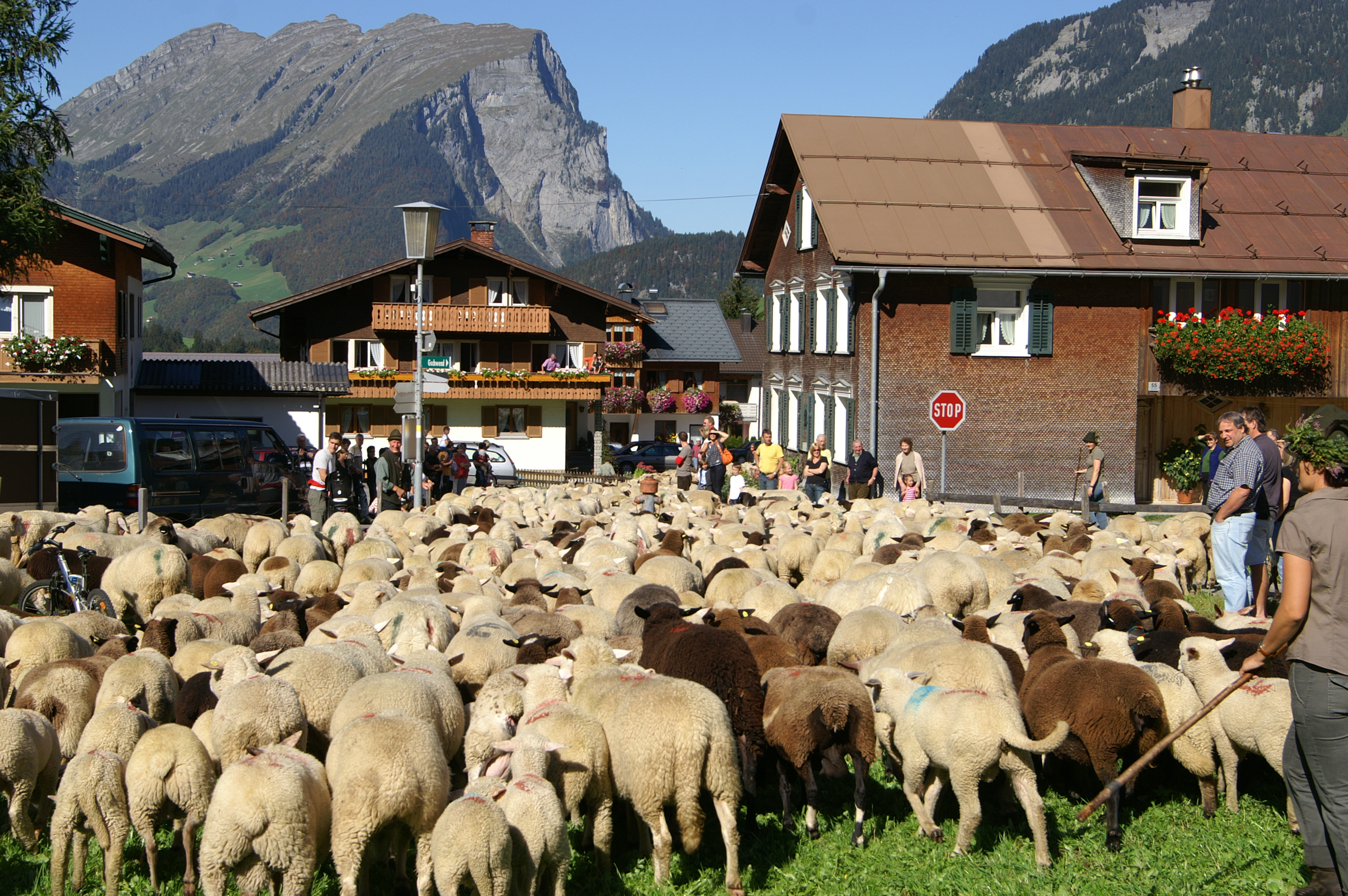 Almabtrieb der Schafe vom Schröcken nach Schoppernau im Bregenzerwald Dieses Highlight wird mit dem “Veahmätle” (kleiner Viehmarkt) gefeiert.